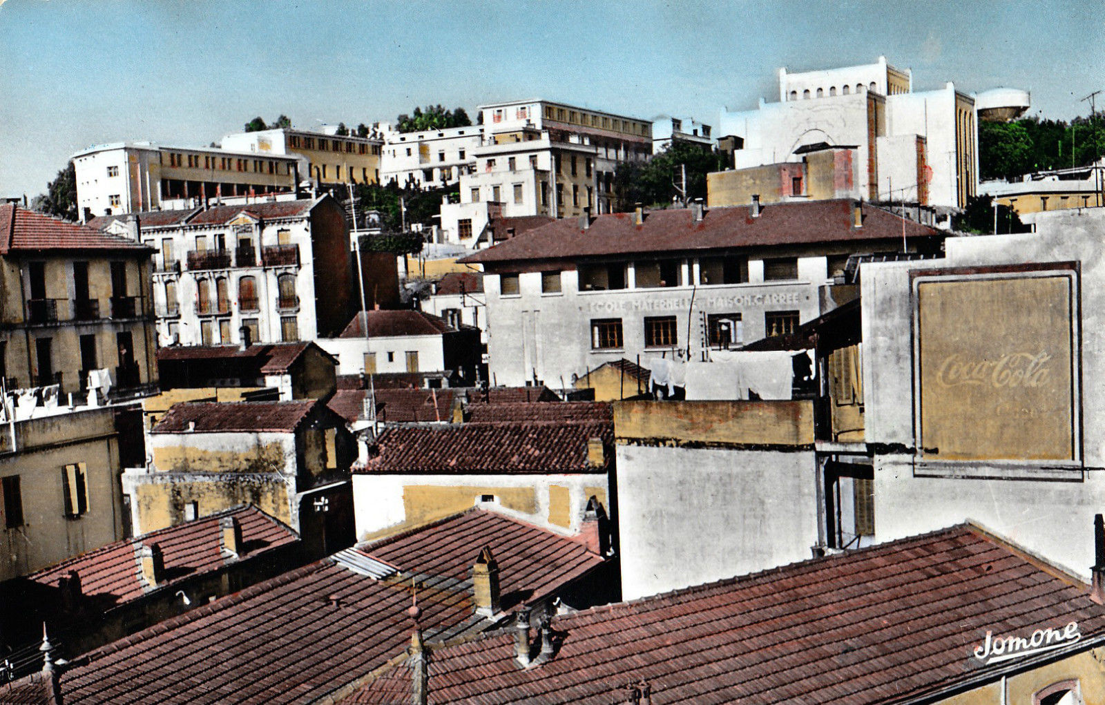 Maison-Carrée (Algérie du temps de la présence française): vue de l'école maternelle et au fond l'église. Aujourd'hui arrondissement d'Alger.